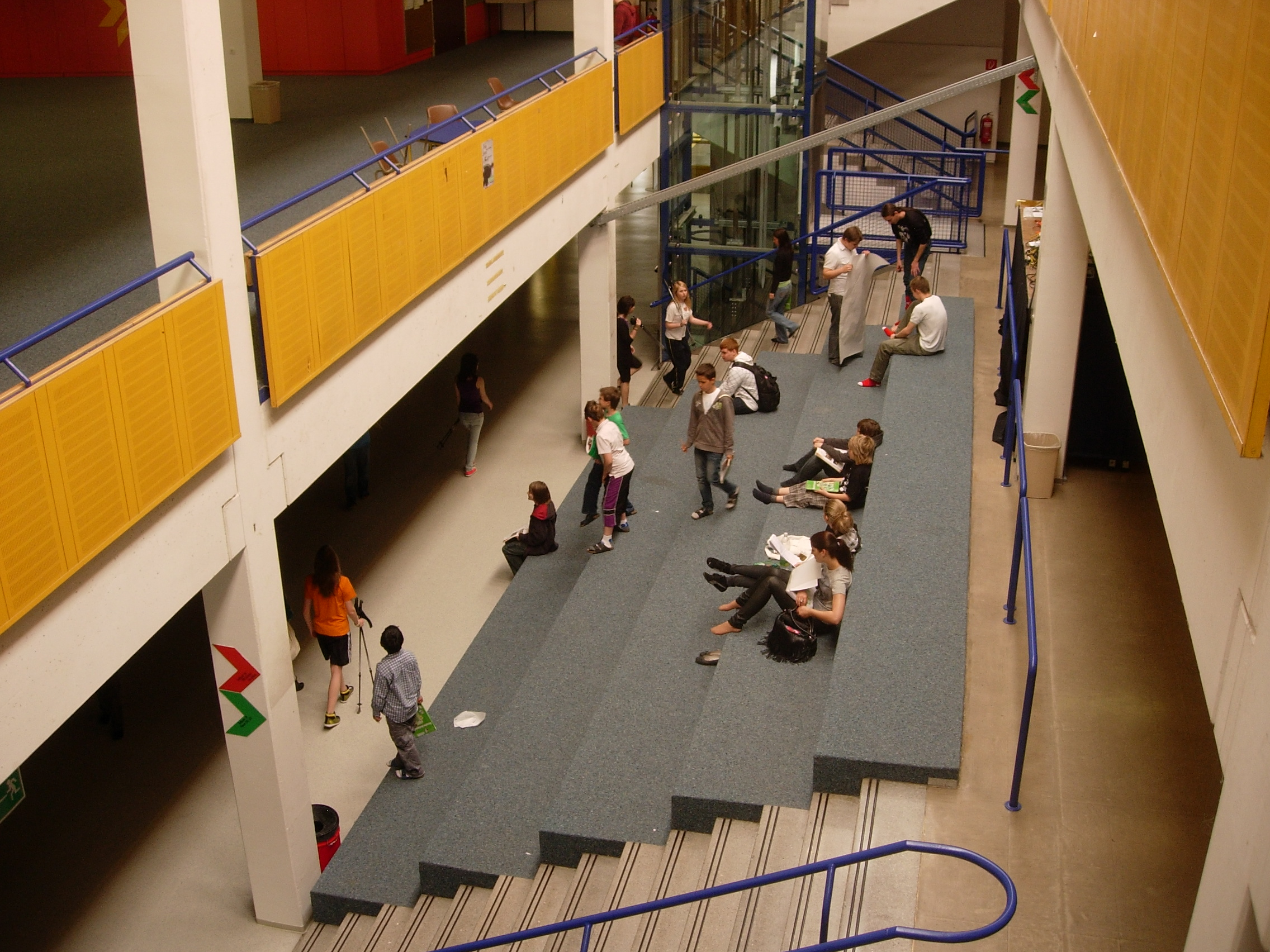 Die Sitzstufen des Bundesrealgymnasiums Traun.